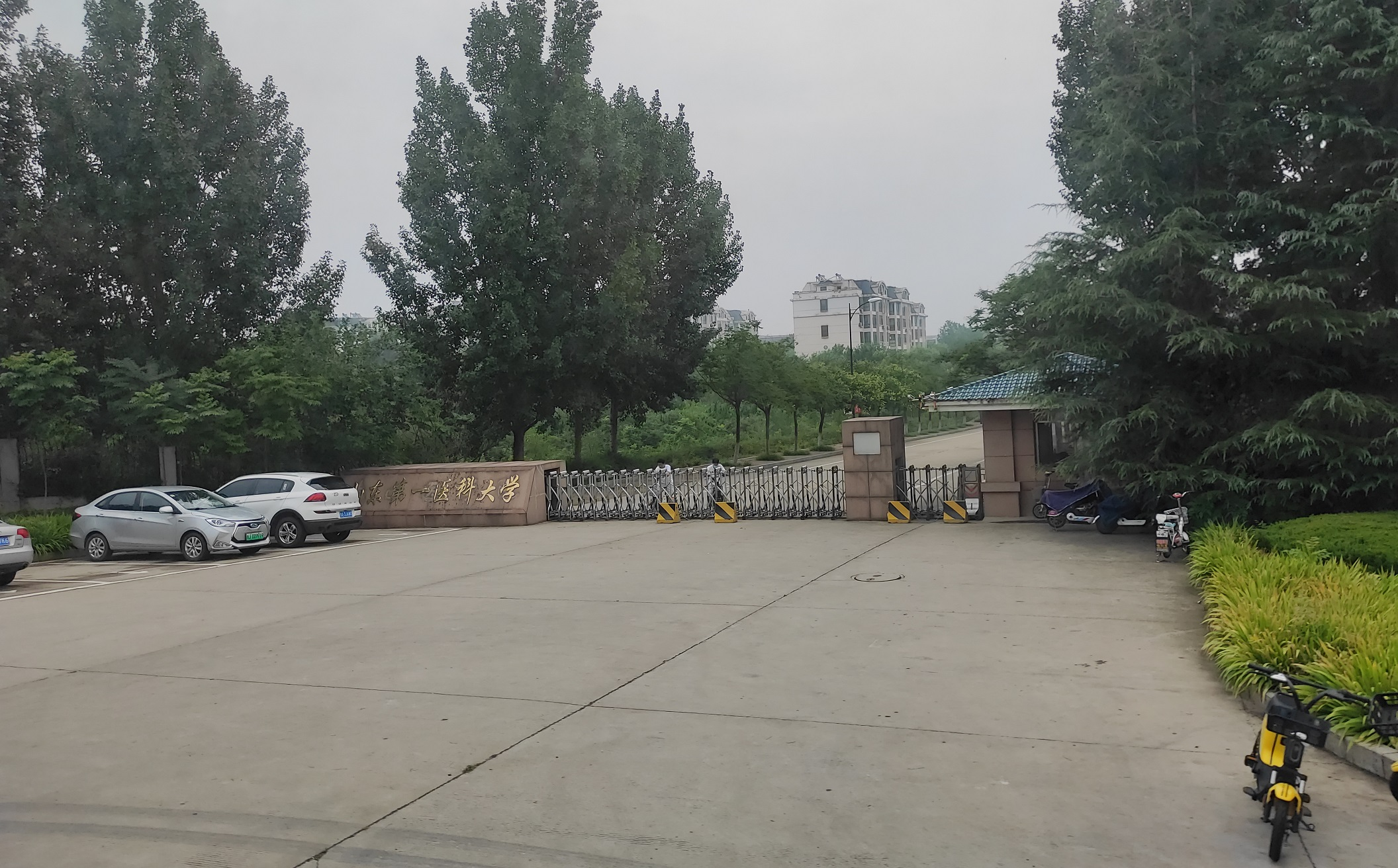 山东第一医科大学西校门